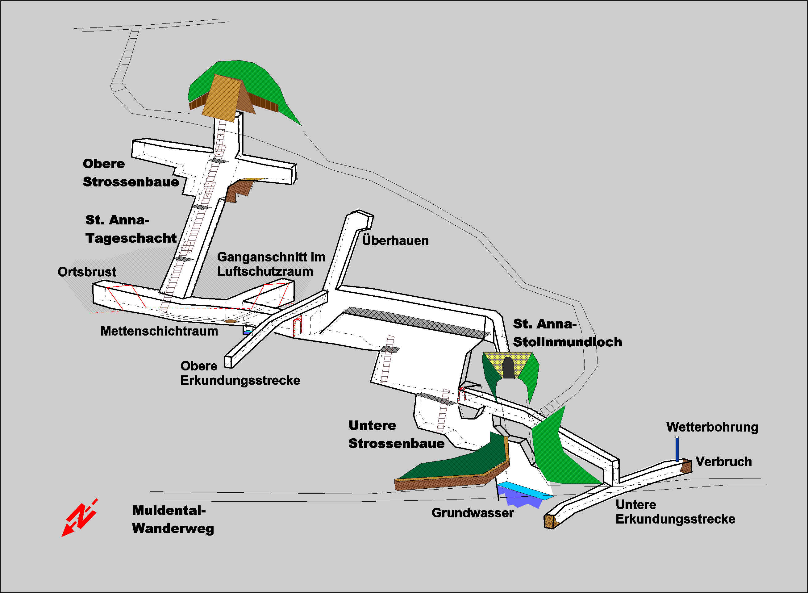 Schematisches Raumbild des Besucherbereiches des Bergwerkes St.Anna Fundgrube in Herrnsdorf/Wolkenburg